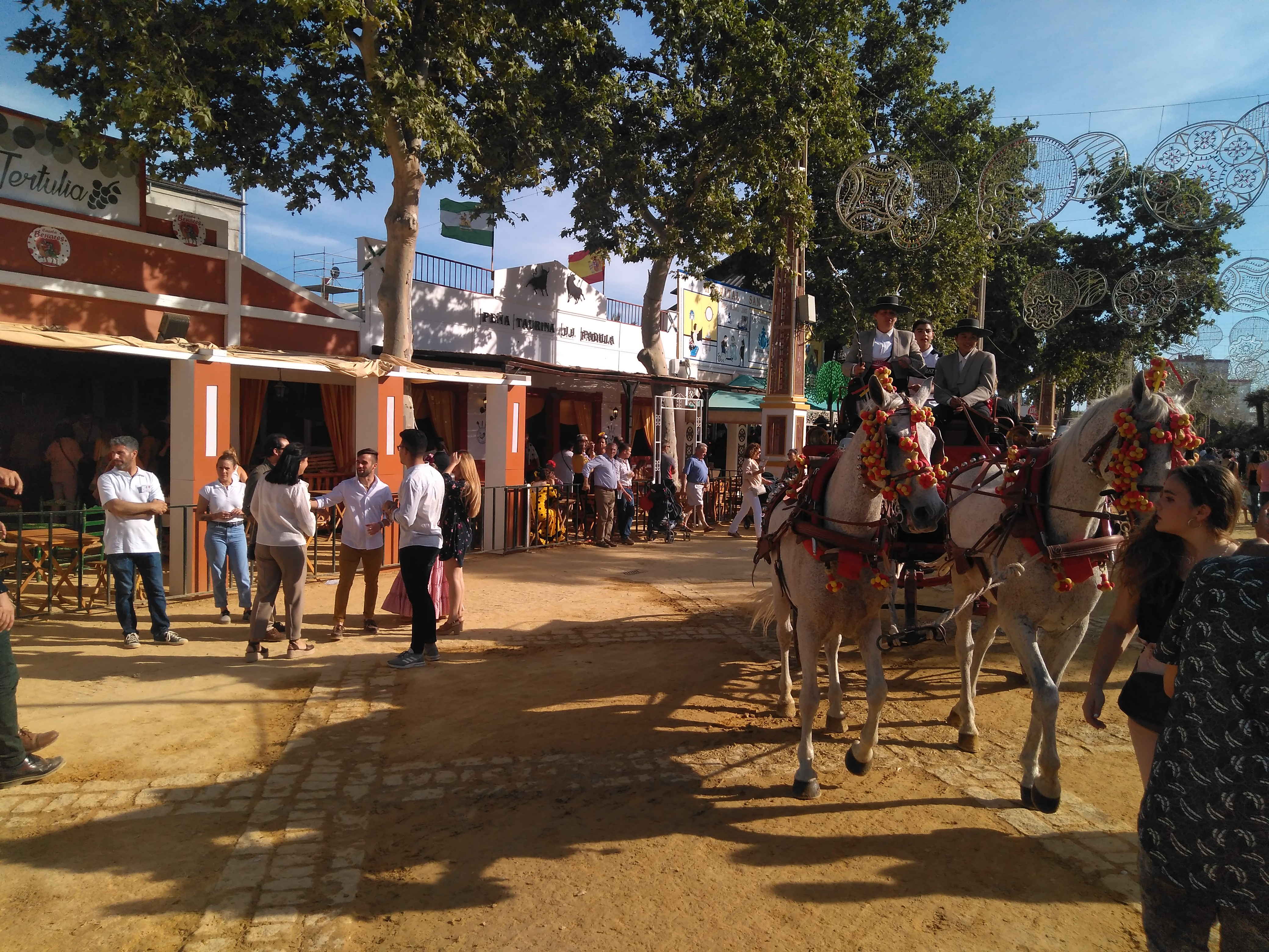 Caseta de la Peña taurina Peña Juan José Padilla - Feria del Caballo 2019 (Jerez de la Frontera, España)